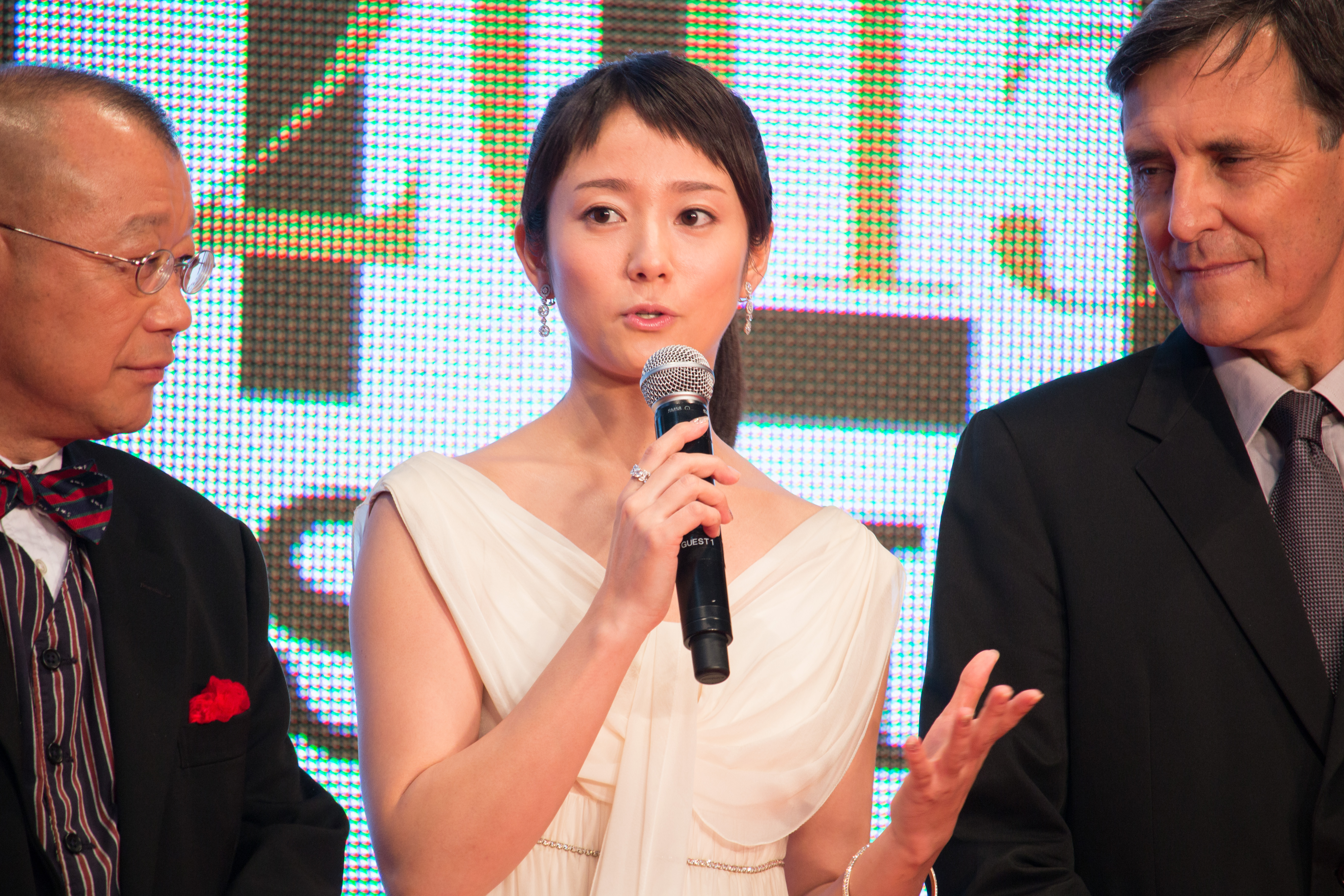 第28回 東京国際映画祭 オープニングセレモニー 笑福亭鶴瓶 木村文乃 ジャック・クルーゾ(シーズンズ)